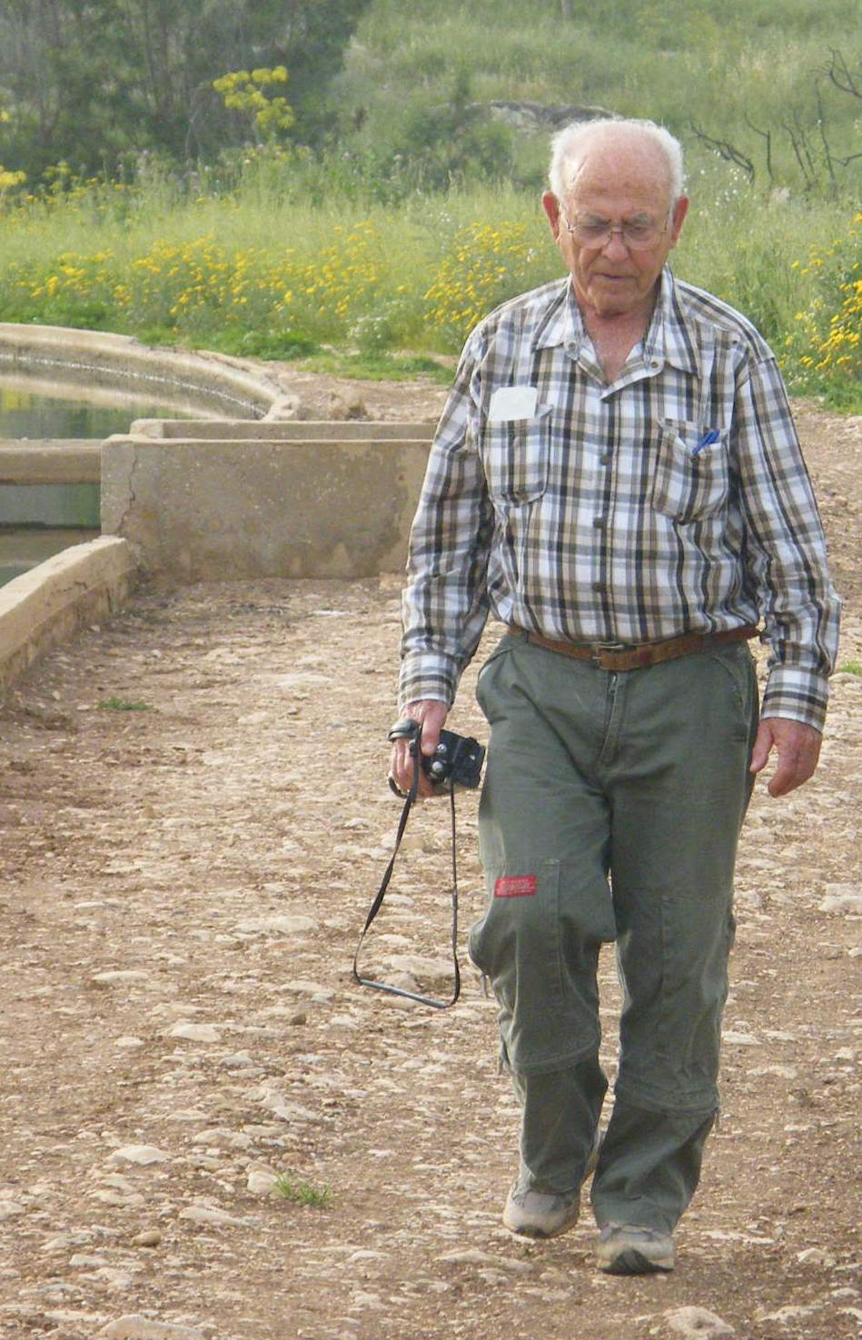 יגאל סלע -- הליכה בעמק הירדן